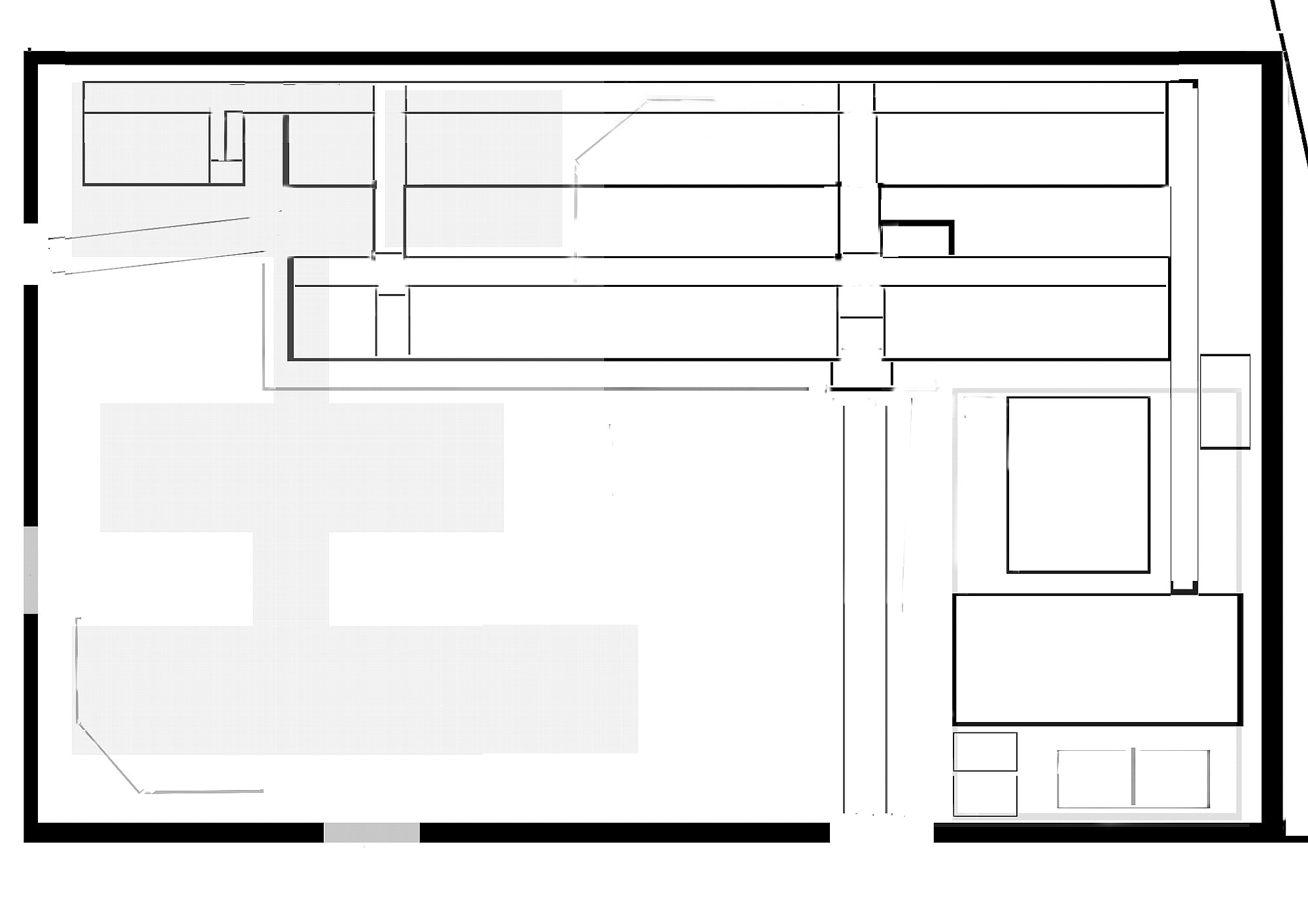 千葉県野田市立第二中学校・旧校舎 構内図